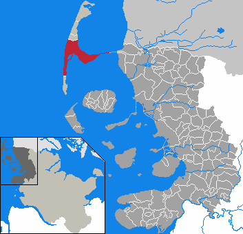 Sylt in Schleswig-Holstein - district Nordfriesland